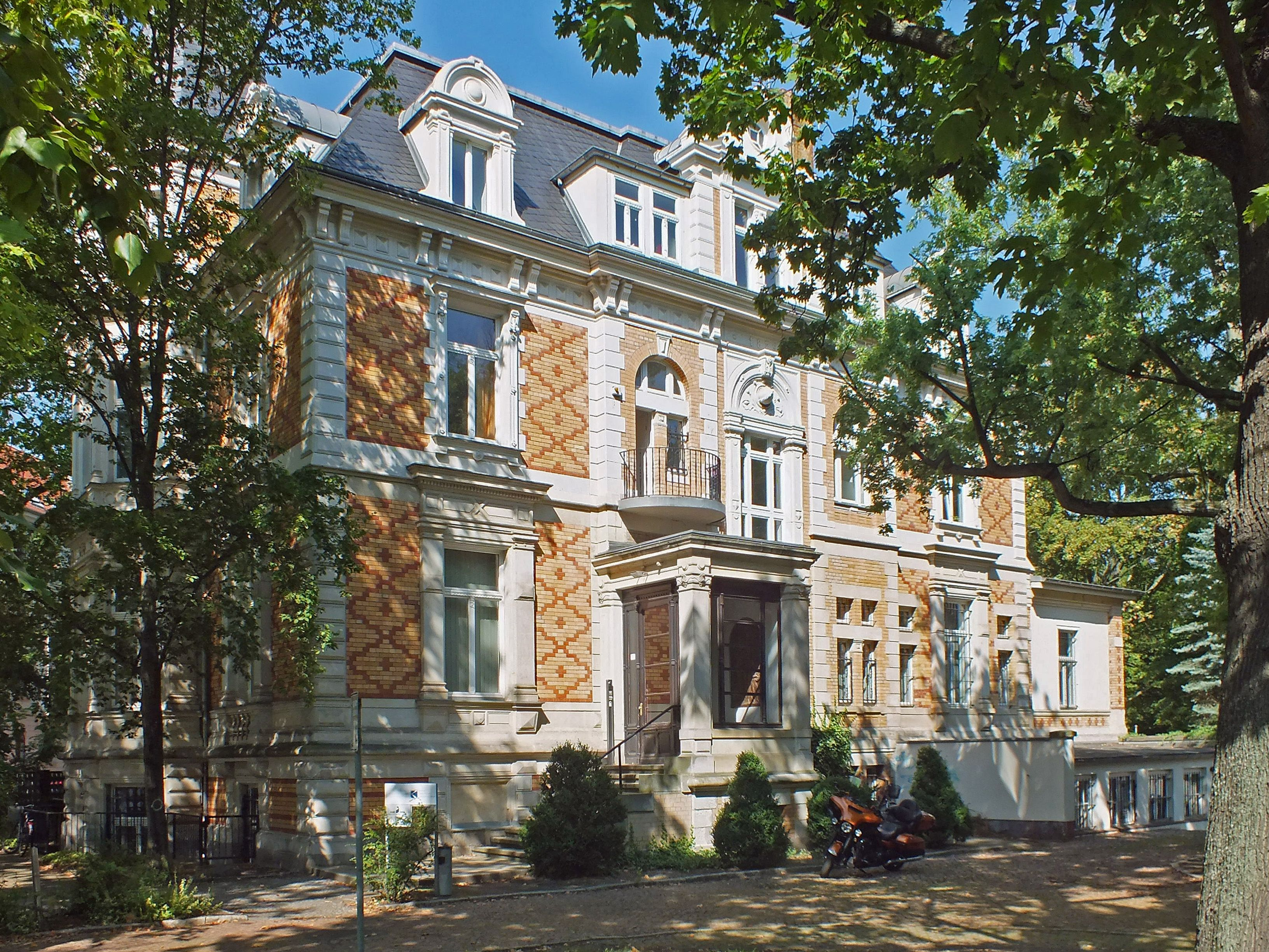 Die Schwabe-Villa am Elsapark in Leipzig